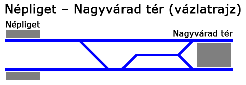 Az M3-as metró Népliget és Nagyvárad tér közötti szakaszának vázlatrajza